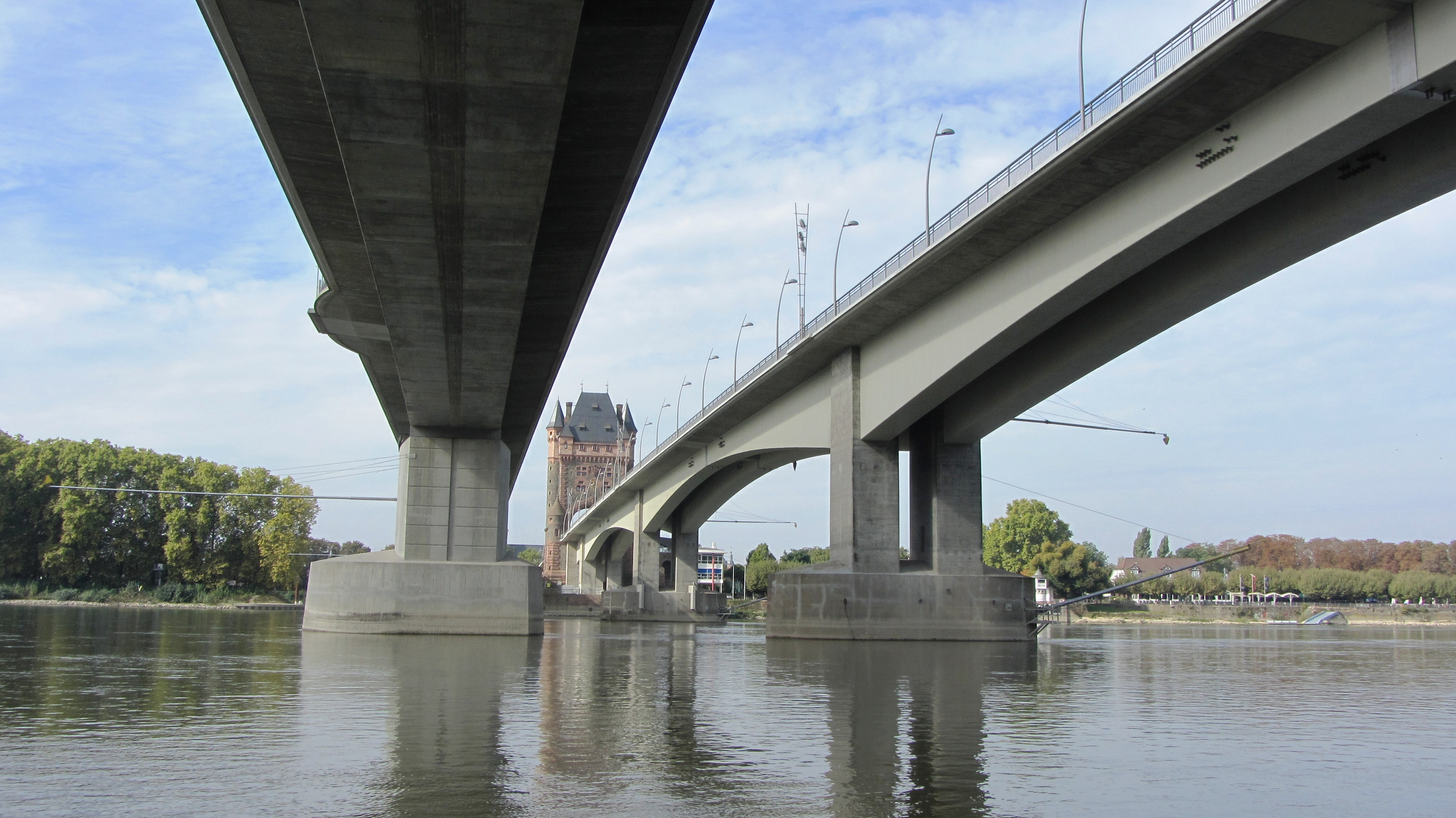 Pont des Nibelungen 2014 vue de "Hesse", 1